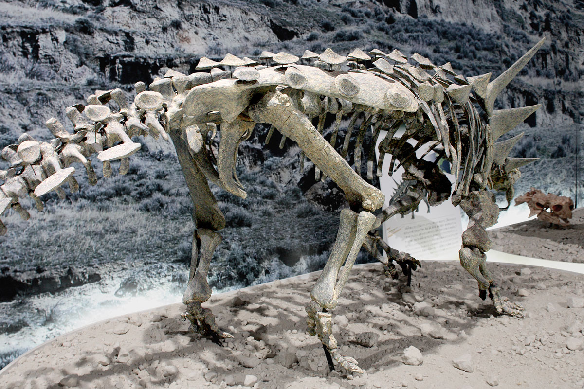 Animantarx - 02